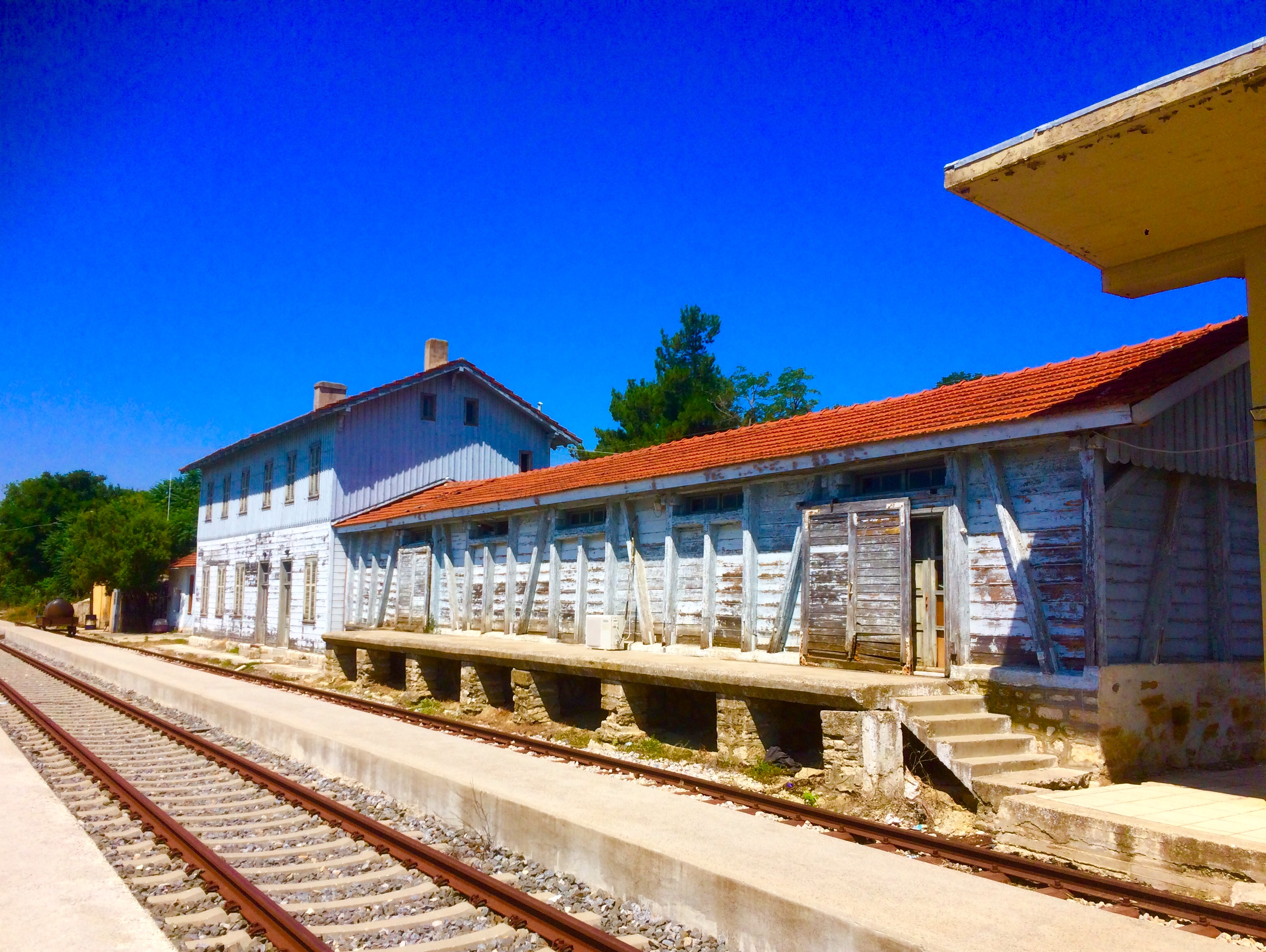 Der durch die Franzosen errichtete Bahnhof in Didymoticho